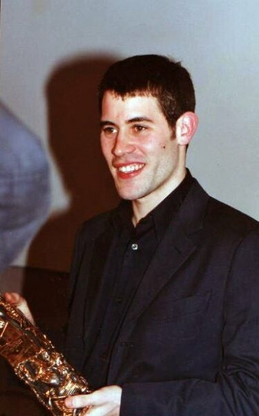 Jalil Lespert à la cérémonie des Césars.